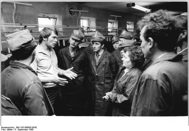 LPG Passow, Besuch einer polnischen Armeedelegation ADN-ZB Müller 5.9.80-Frankfurt Oder-Waffenbrüderschaft 80-Manöverteilnehmer der polnischen Volksarmee waren am Freitag zu Gast in der LPG Tierproduktion Passow, Kreis Angermünde, hier im freundschaftlichen Gespräch mit Melkern der LPG.